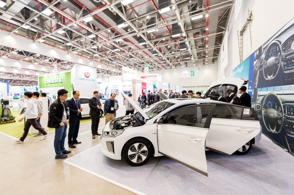 대구 국제그린에너지엑스포